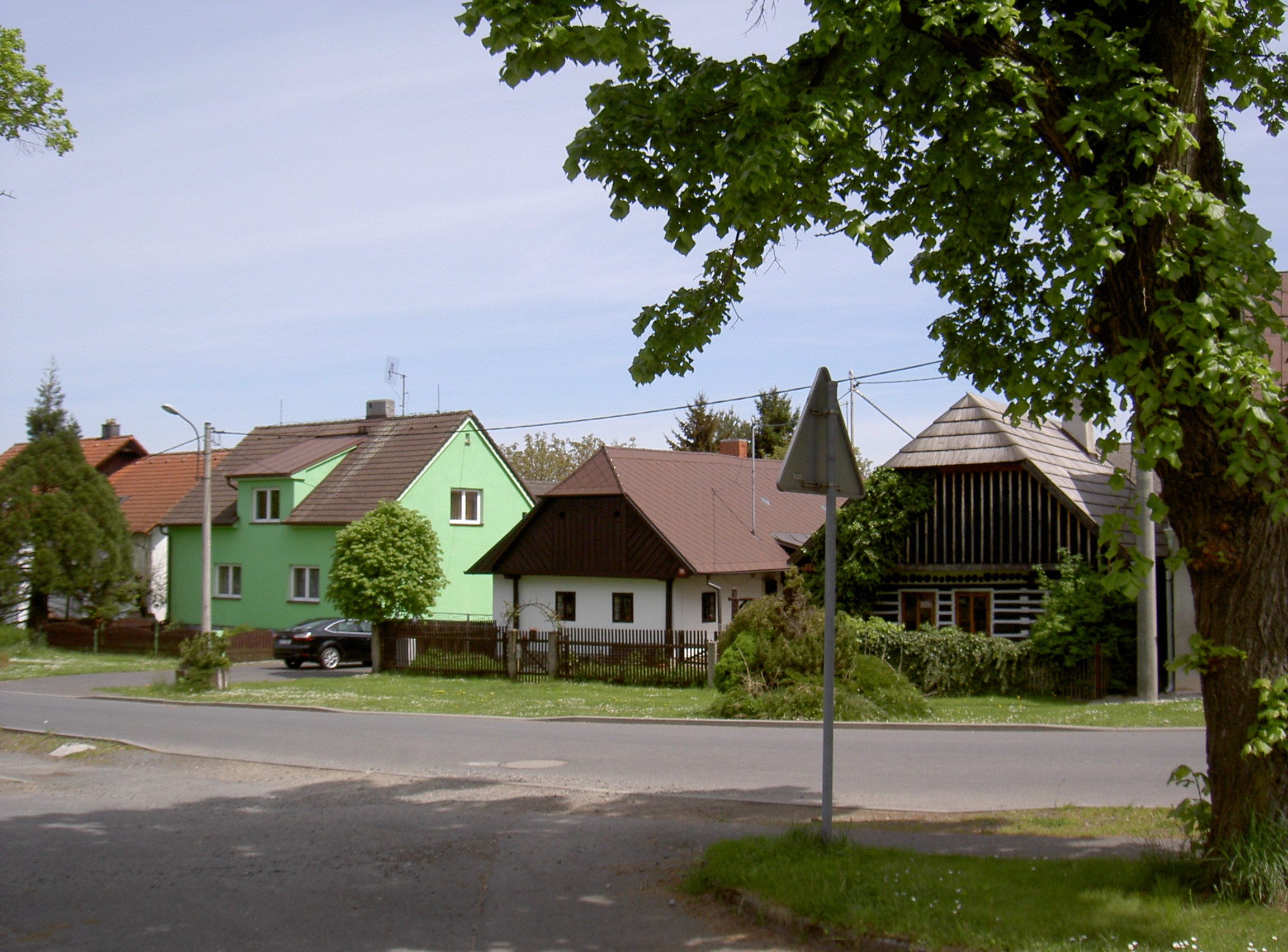 Alte Häuser in Chodov